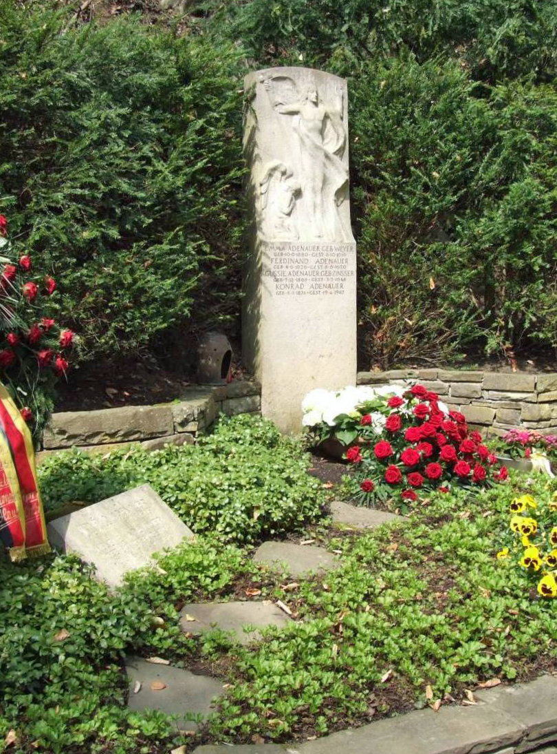 Grab von Konrad Adenauer und Emma Weyer auf dem Waldfriedhof in Rhöndorf